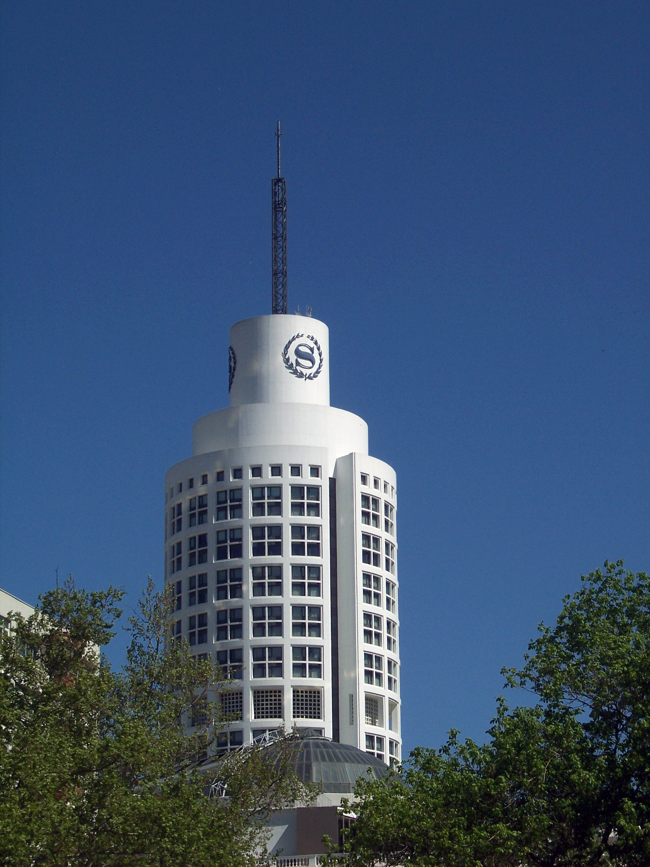 Hotel Sheraton Ankara. Ankara/Turkey.